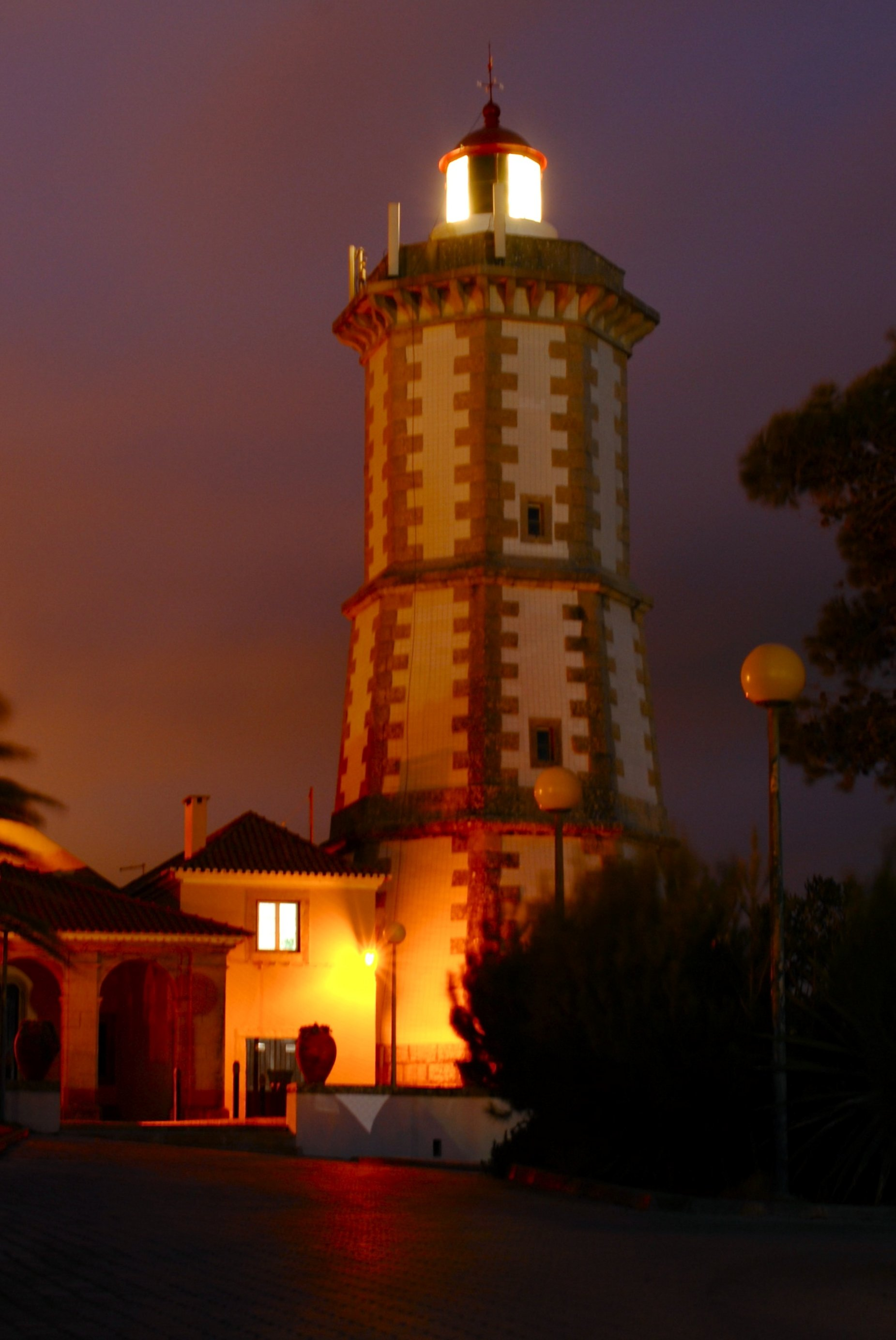 Guia lighthouse, Guia, Cascais, Portugal.